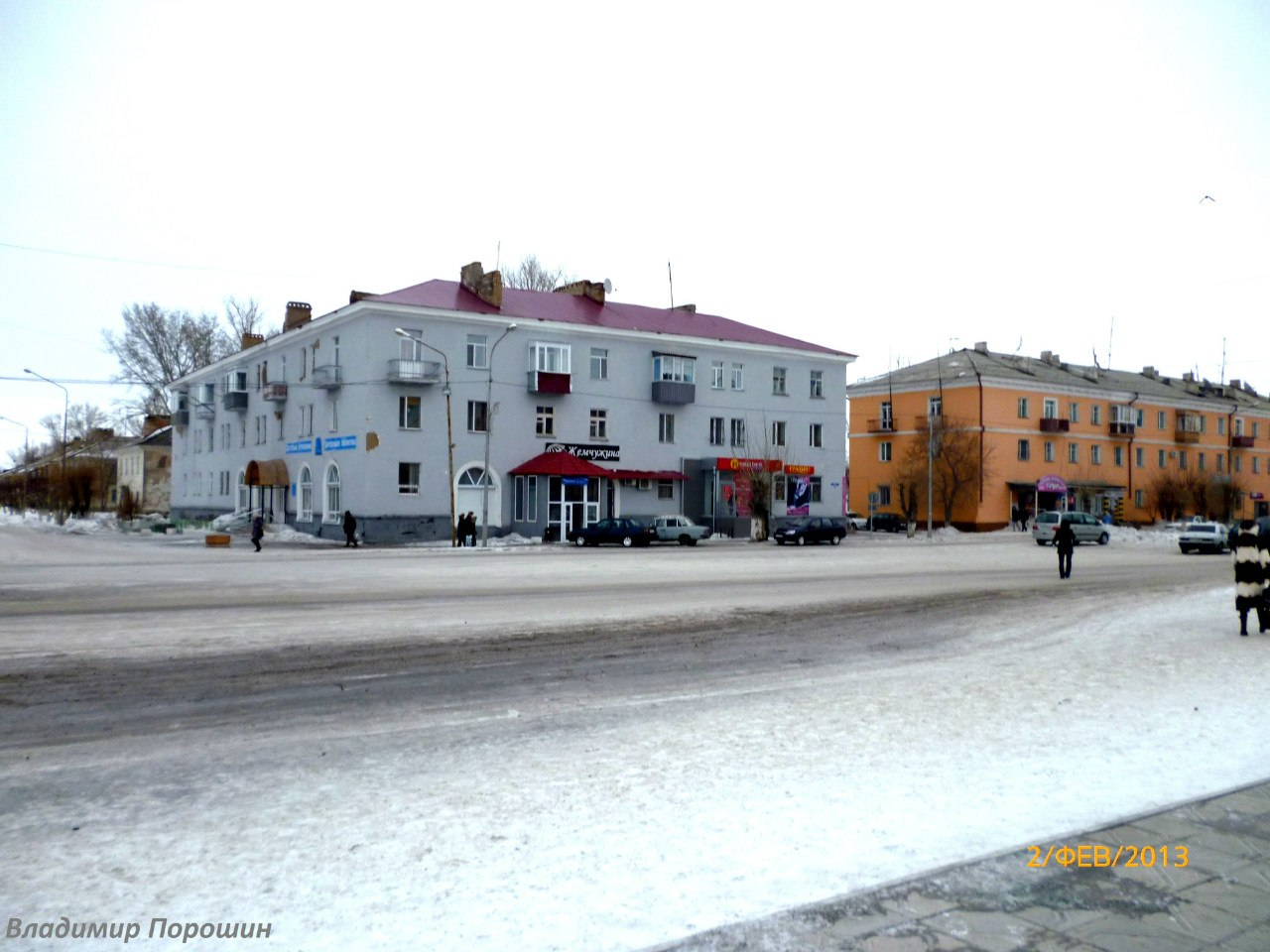 Прогулка с фотоаппаратом по родному городу